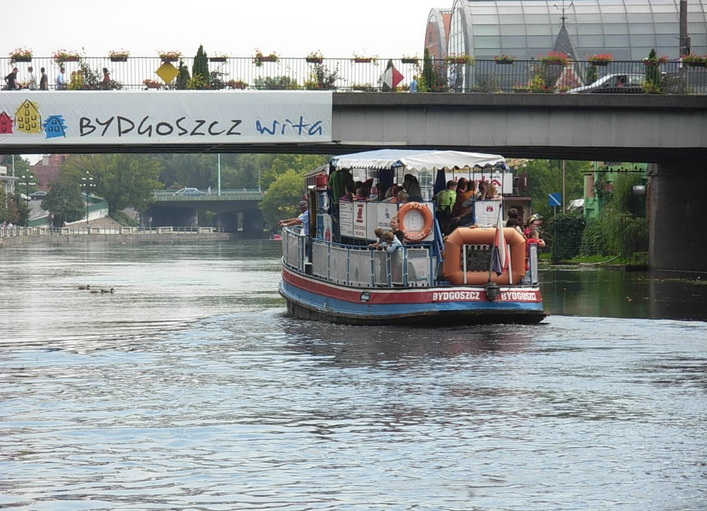 Tramwaj wodny po mostem staromiejskim w Bydgoszczy